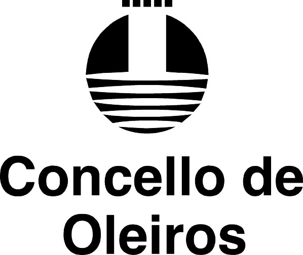 El logo del ayuntamiento